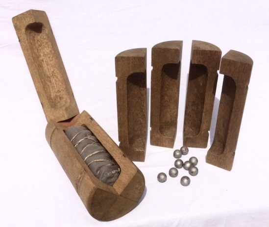 aufgeklappter vierteiliger Hagelbehälter aus Eichenholz (Rekonstruktion im Kaliber 11,5cm). Der Leinensack enthält 70 Kugeln á 20mm. Das Original befindet sich in den Kunstsammlungen der Veste Coburg. Daneben vier einzelne Treibkäfigsegmente eines baugleichen Hagelbehälters und einzelne Kugeln